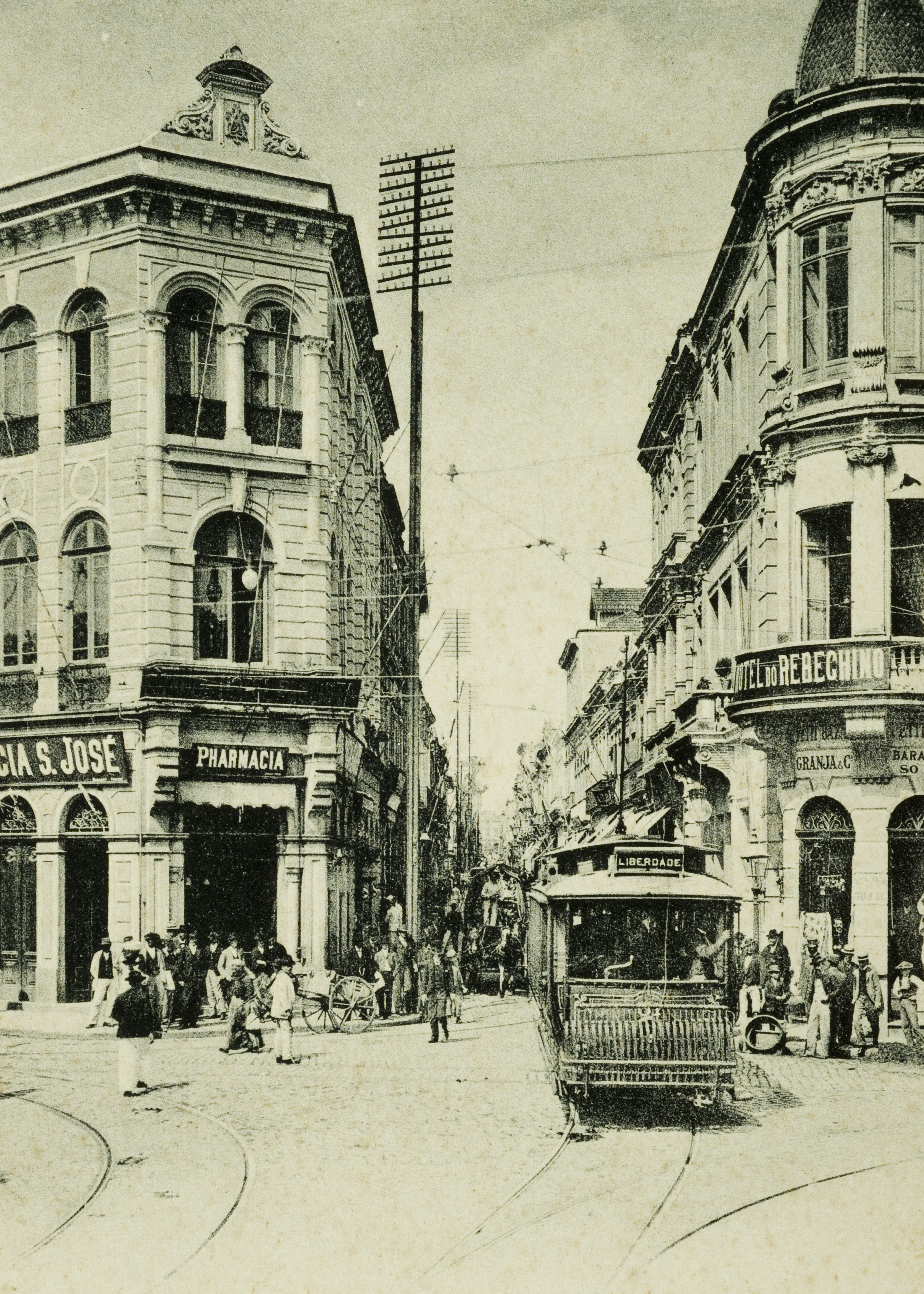 Obra que integra o acervo do Museu Paulista da USP.